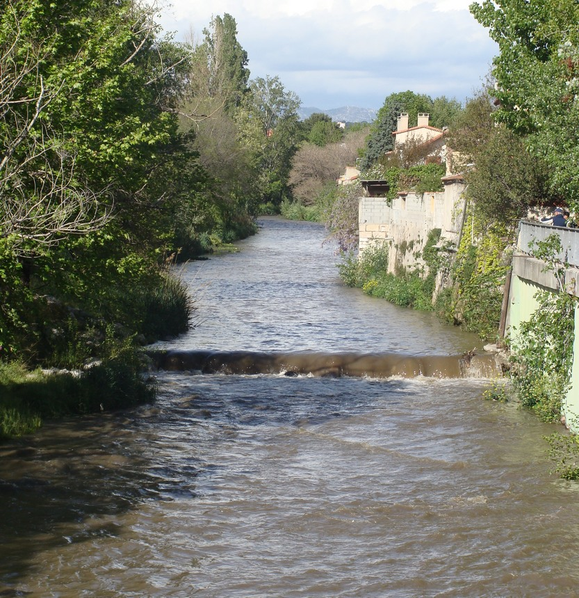 L'Huveaune à Sainte-Marguerite (Marseille 9e arr.), peu avant son confluent avec le Jarret.